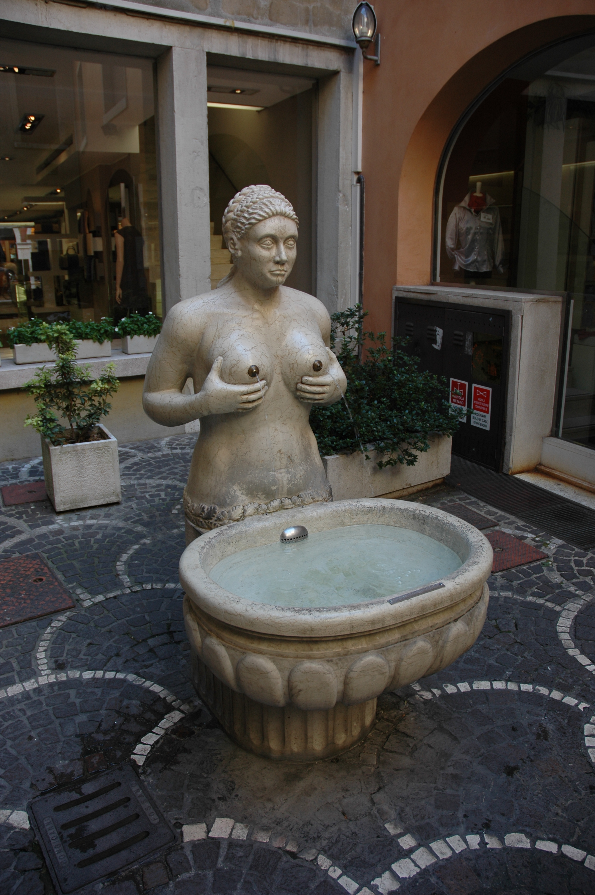 Foto che ritrae la Fontana delle Tette